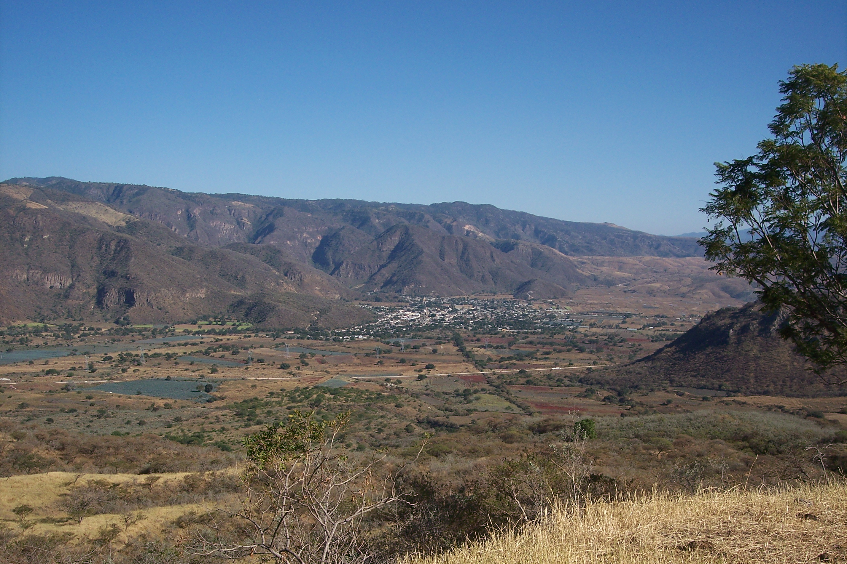 Jala... y al fondo, la Sierra Madre Occidental (una pequeña parte).